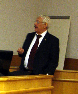 Пустовойт Владислав Иванович — академик Российской академии наук. Читает лекцию-доклад «О проблеме обнаружения гравитационных волн» в МИЭТ